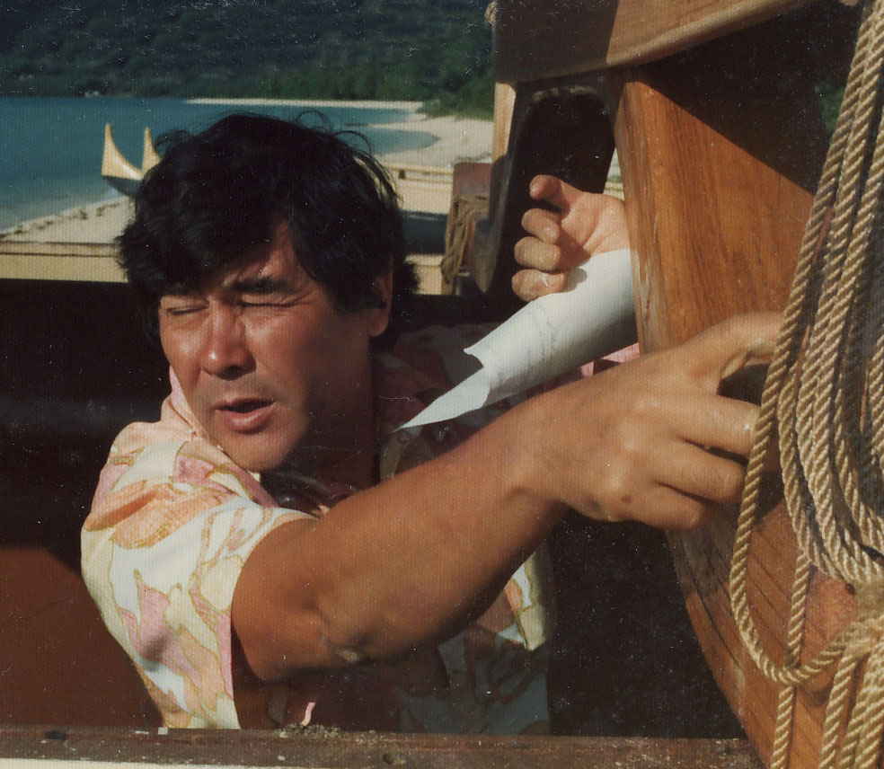 Herb Working On Hokule'a